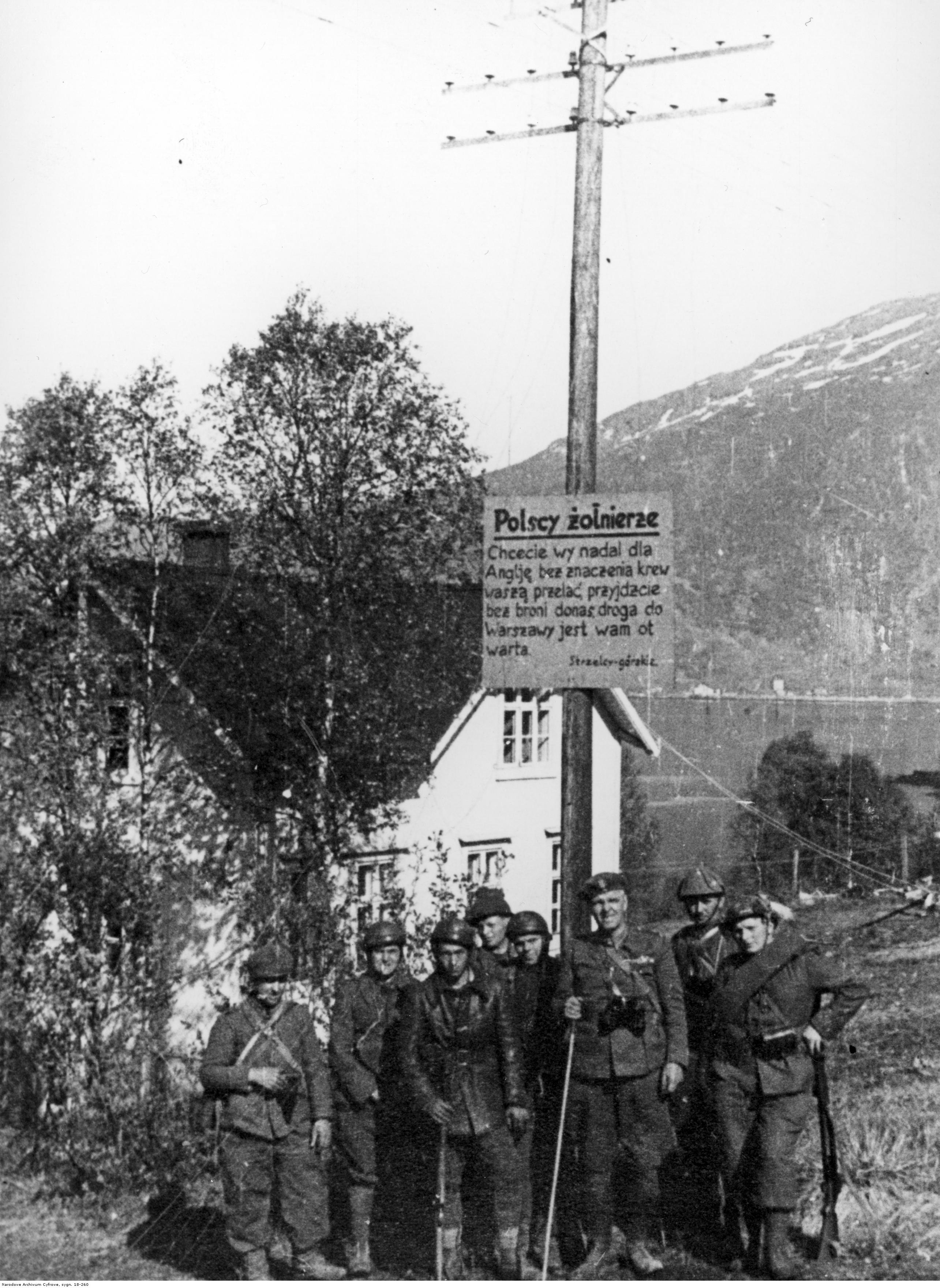 Żołnierze Samodzielnej Brygady Strzelców Podhalańskich w Norwegii. Na słupie widoczny napis umieszczony przez Niemców zachęcający Polaków do dezercji. Archiwum Fotograficzne Czesława Datki. Sygnatura: 18-260